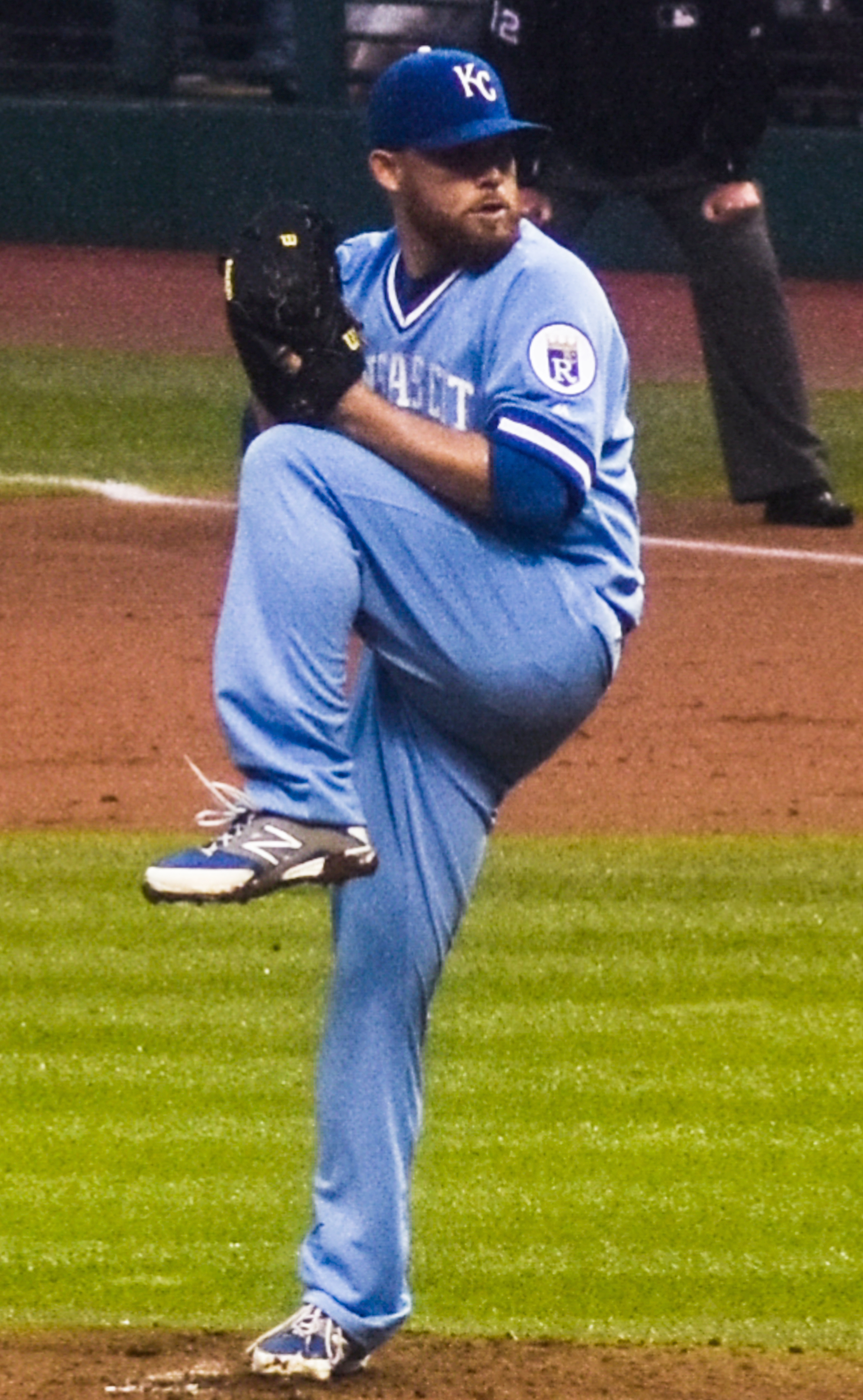 Ian Kennedy